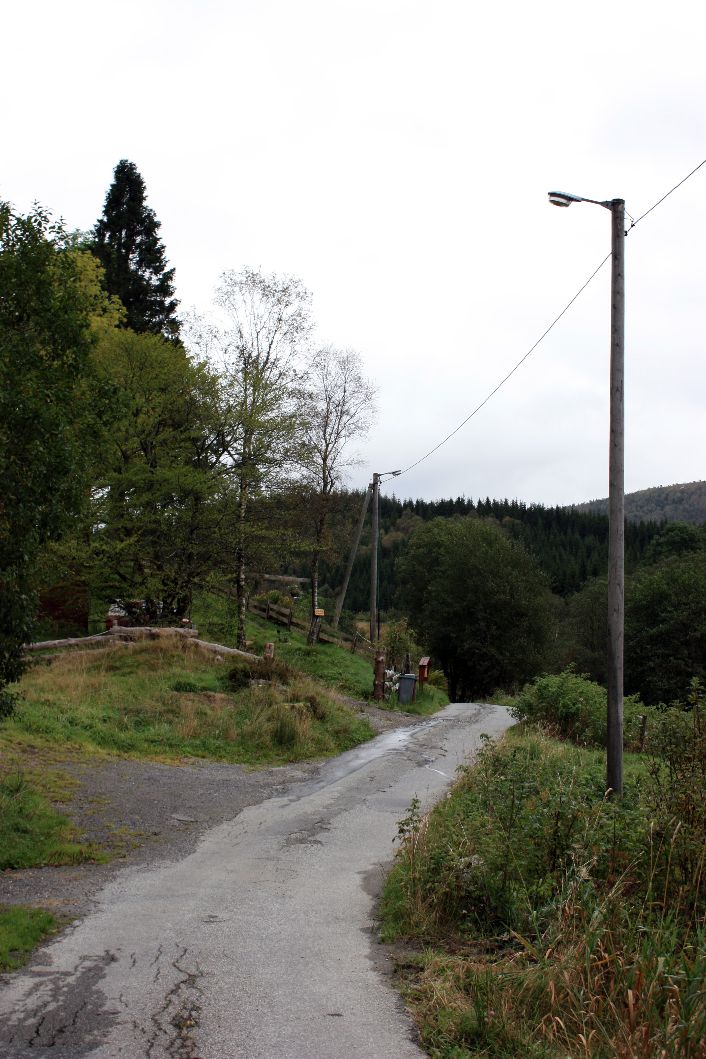 Hednemyrsvegen, Fana, Bergen.